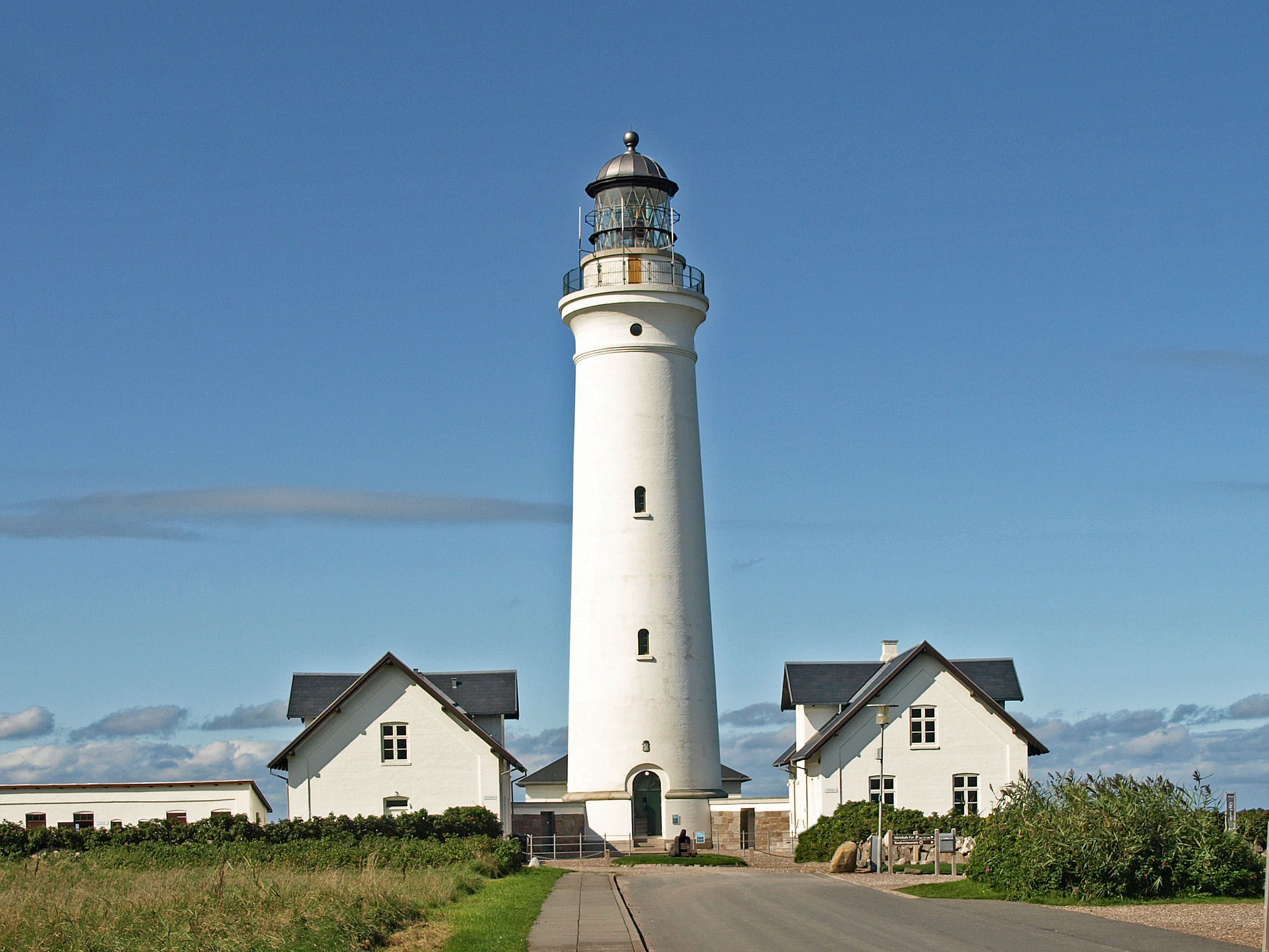 Leuchtturm Hirtshals